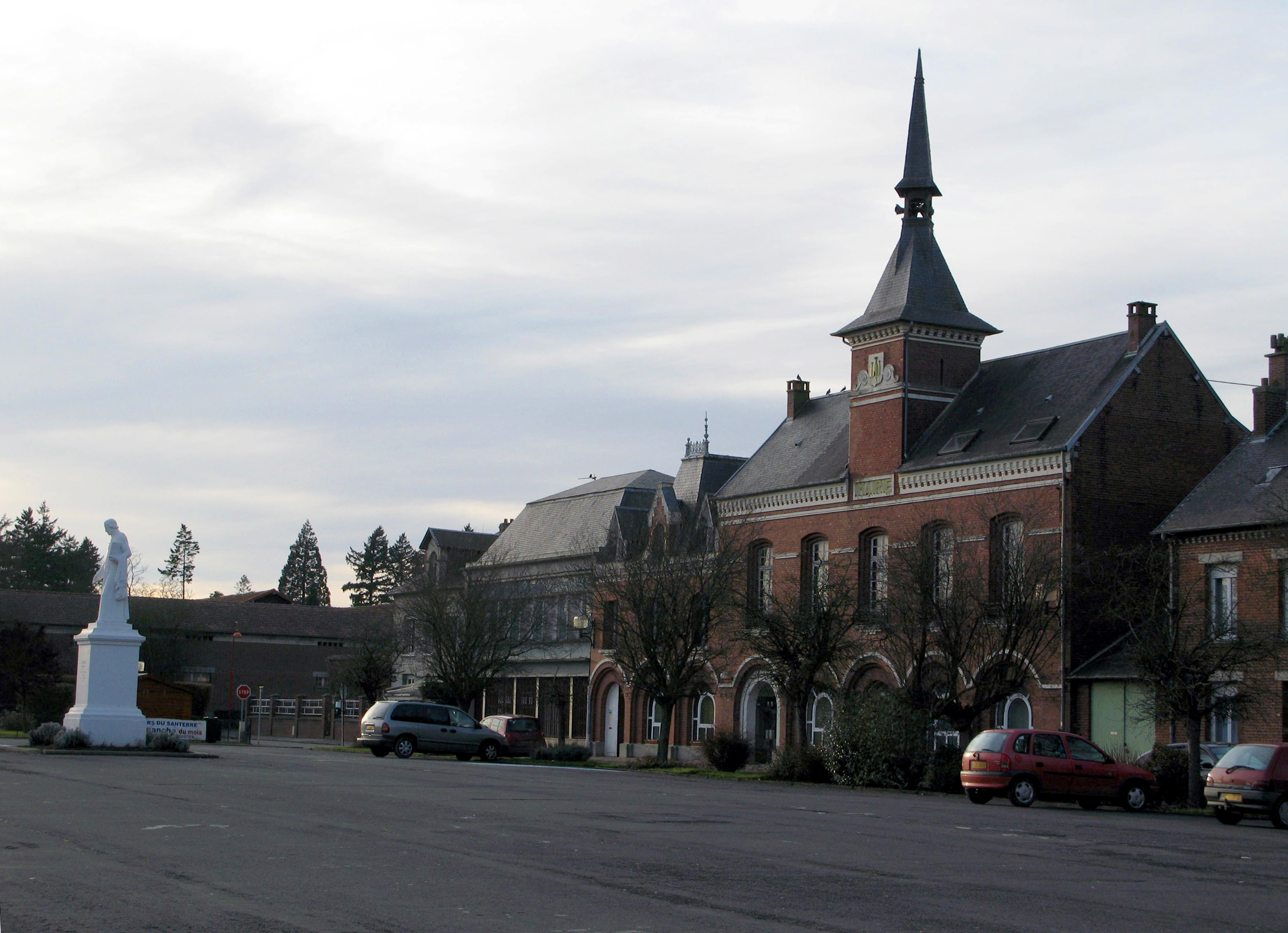 Chaulnes (Somme, France) - La place principale, avec la statue de Lhomond se dressant, toute blanche, devant la Mairie.